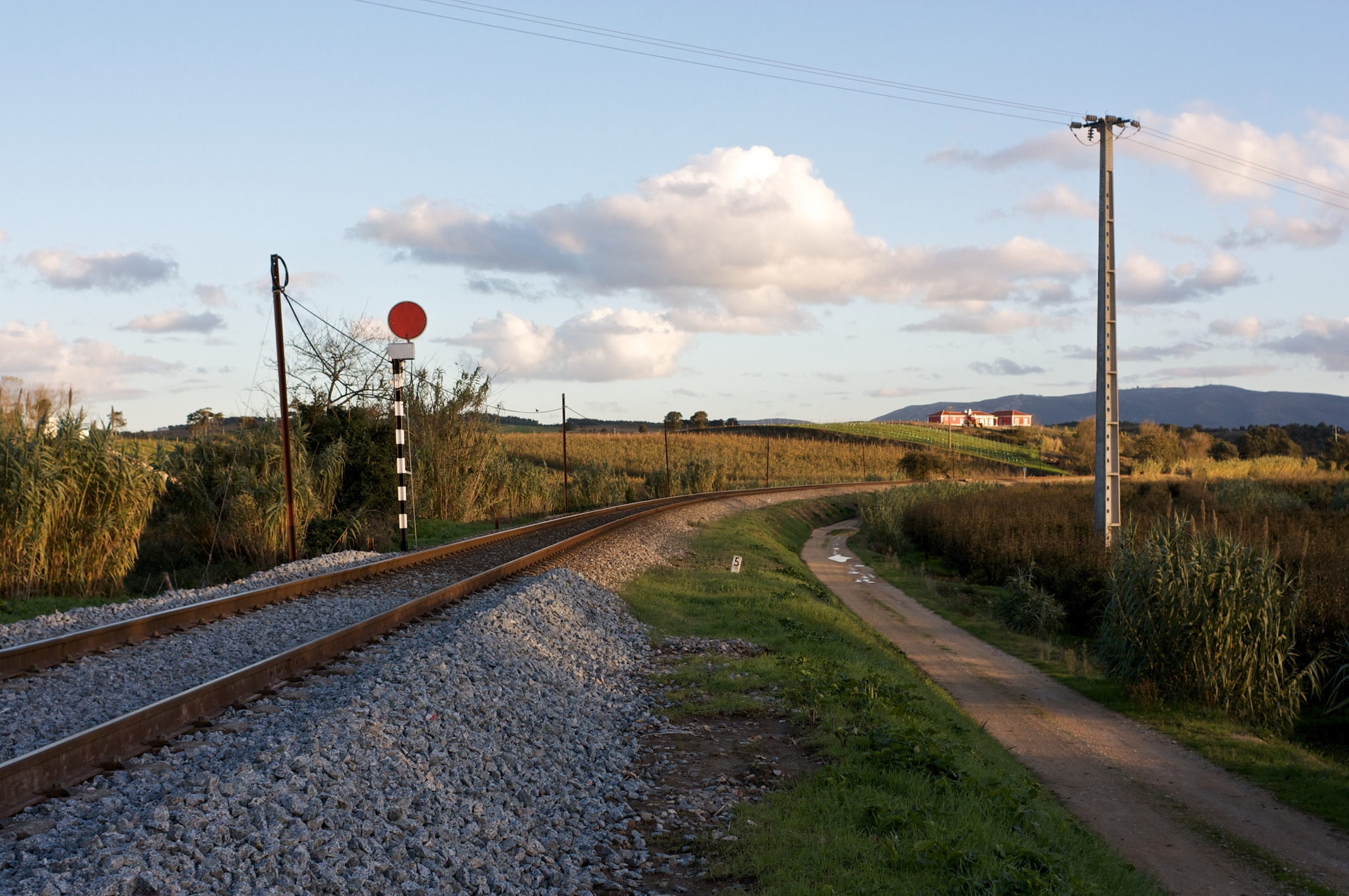 Via férrea: Linha do Oeste [PK 88] Local: Bombarral Data e hora: 2 de Dezembro de 2010 [16h38] Sentido: Agualva • Cacém